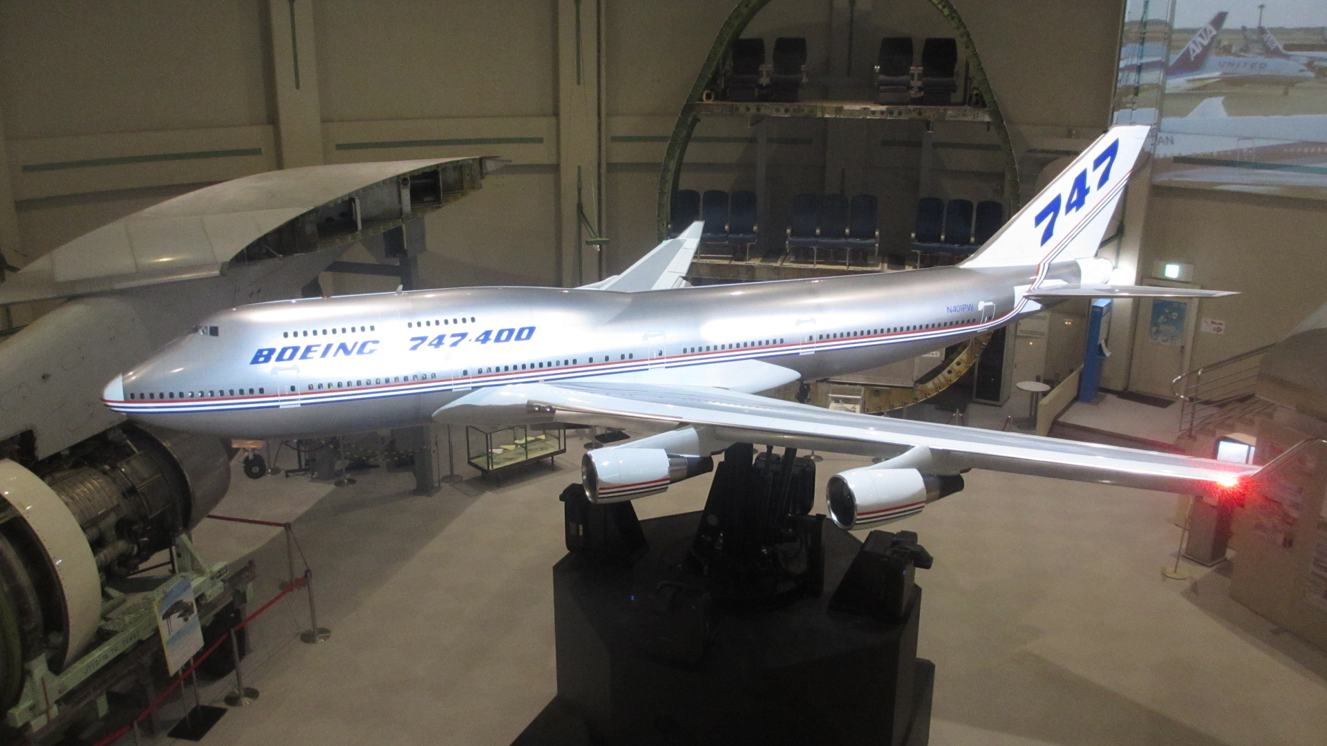 ボーイング747-400試作機N401PW模型 航空科学博物館（千葉県山武郡芝山町）